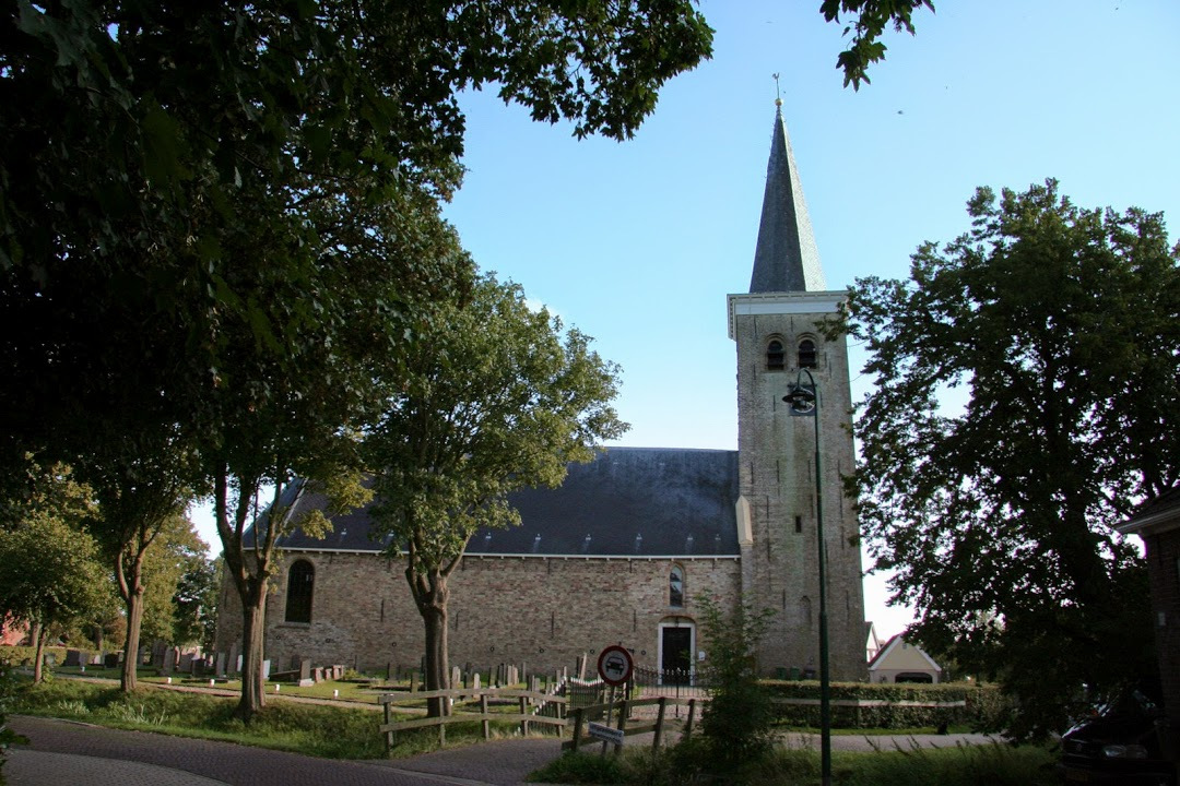 We zien de Hervormde Johanneskerk van het dorp Burgwerd mooi in de bomen staan.